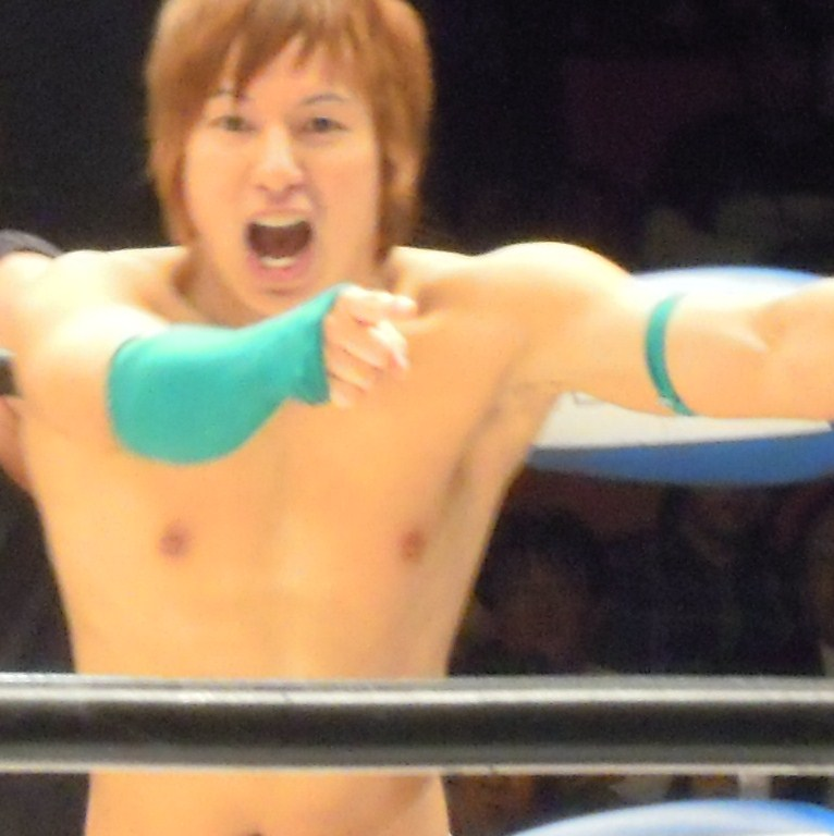 ツトム・オースギ 2010年5月28日 大日本プロレス後楽園ホール大会 投稿者撮影